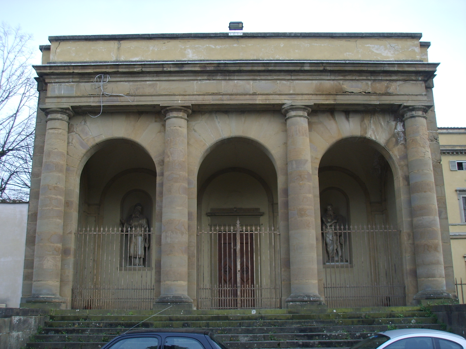 Villa_di_Poggio_Imperiale, chapel